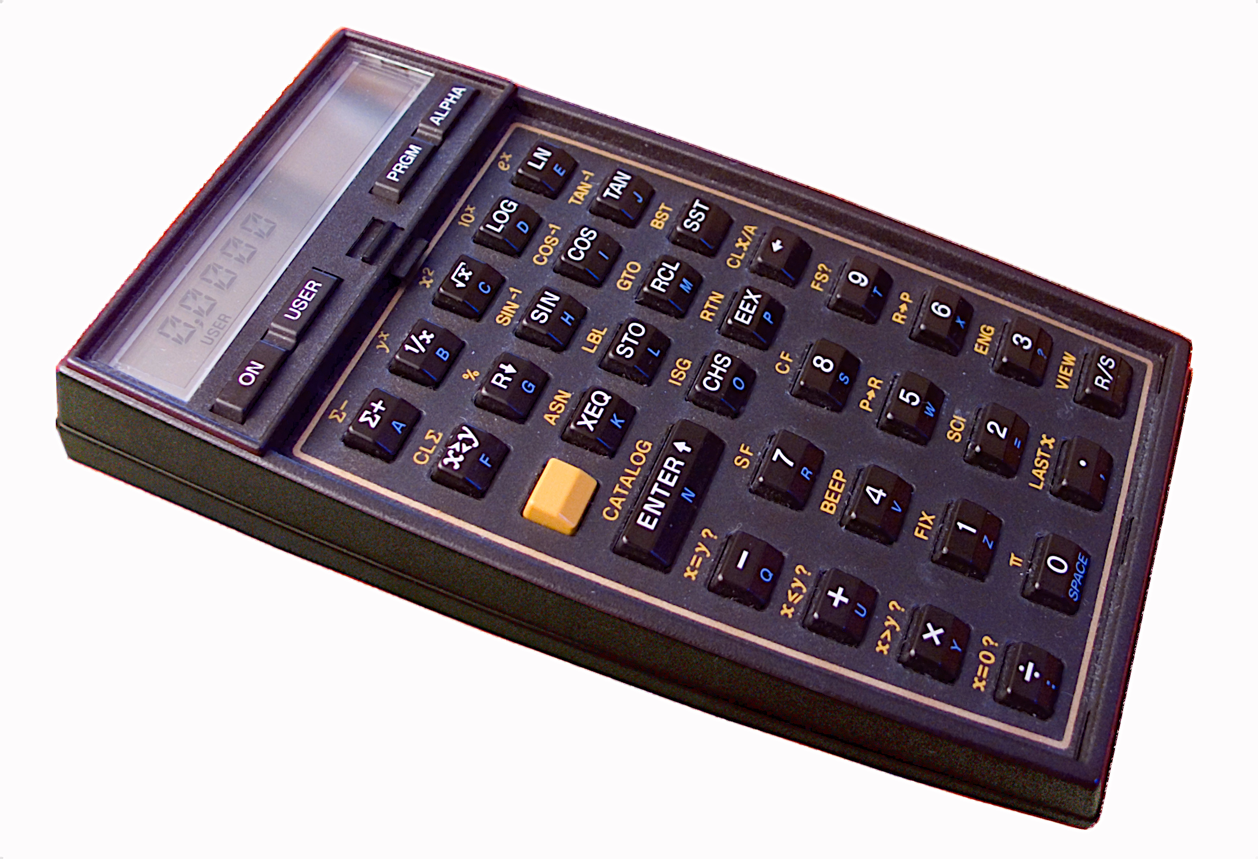 Hewlett-Packard Calculator HP-41C, 1979